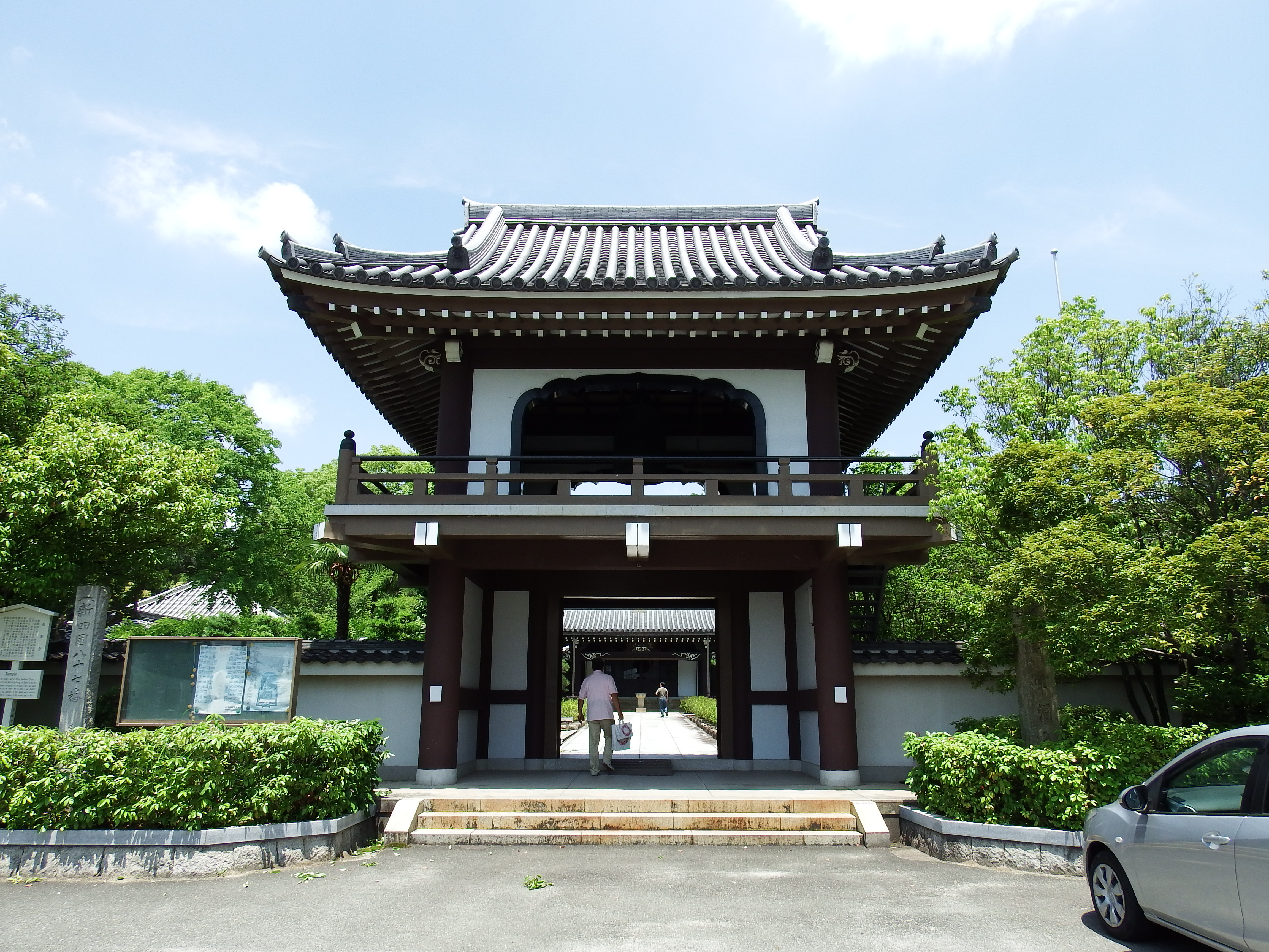 長寿寺山門